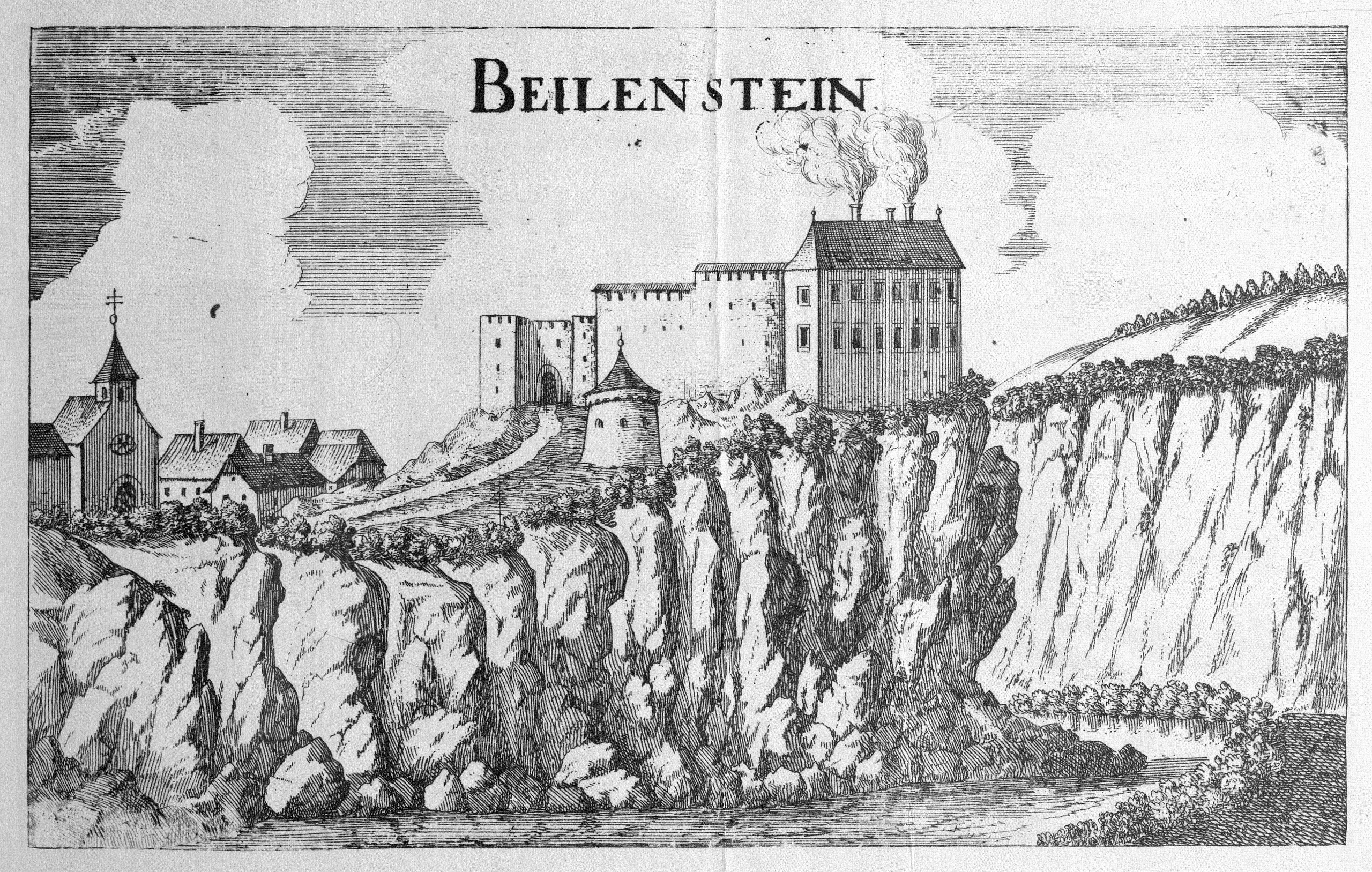 G. M. Vischers Käyserlichen Geographi, Topographia Ducatus Stiriae, Das ist: Eigentliche Delineation / und Abbildung aller Städte / Schlösser / Marcktfleck / Lustgärten / Probsteyen / Stiffter / Clöster und Kirchen / so es sich im Herzogthumb Steyrmarck befinden; Und anjetzo Umb einen billichen Preyß zu finden seynd Bey Johann Bitsch Universitäts Buchhandlern / Auff dem Juden=Platz bey der guldenen Saulen. Graz 1681 Die Nummerierung der Dateien folgt der alphabetischen Reihung der Ortsnamen und entspricht nicht dem Vischer-Register